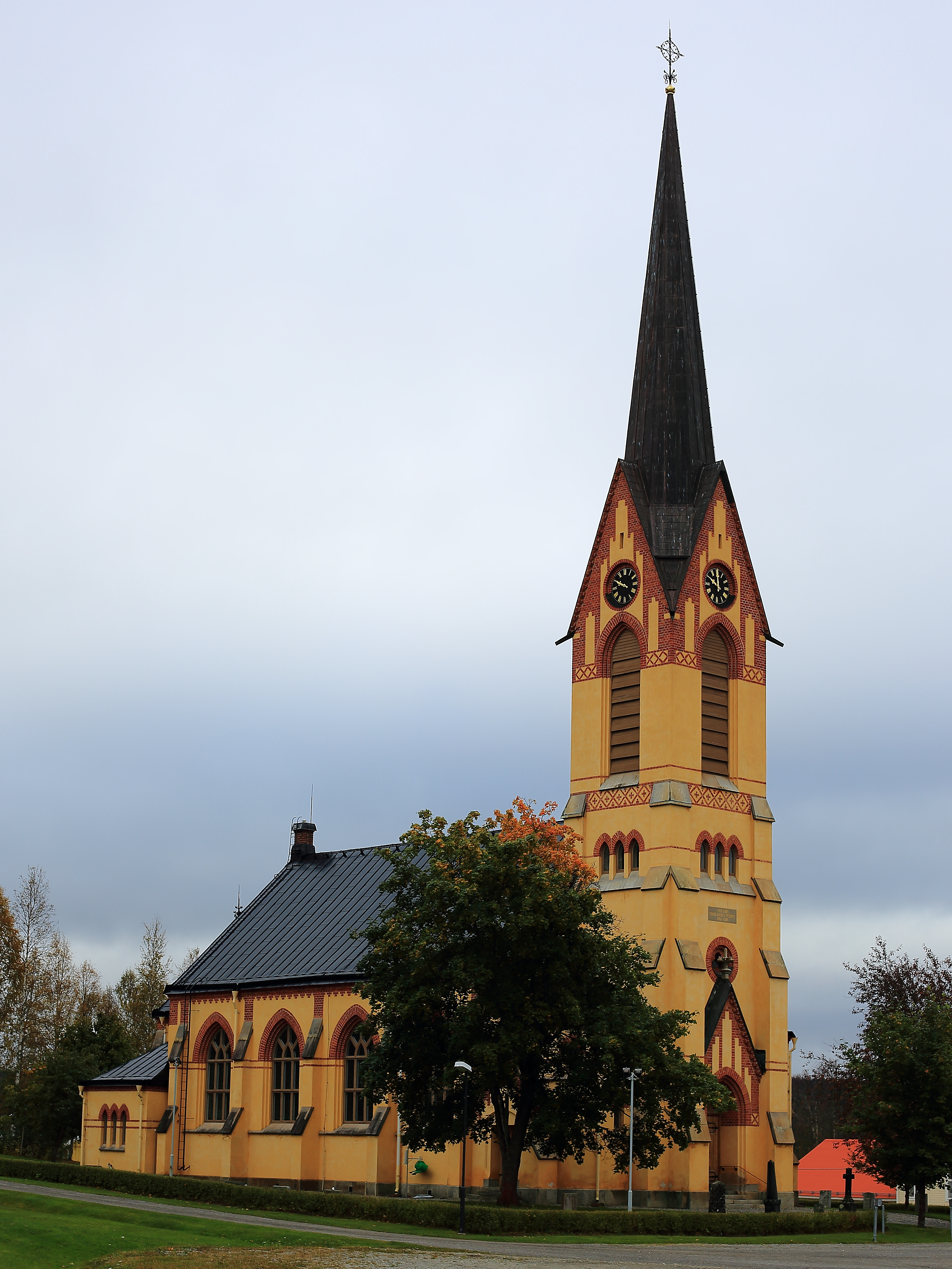 Holms kyrka (Holms Prästbol 1:1)